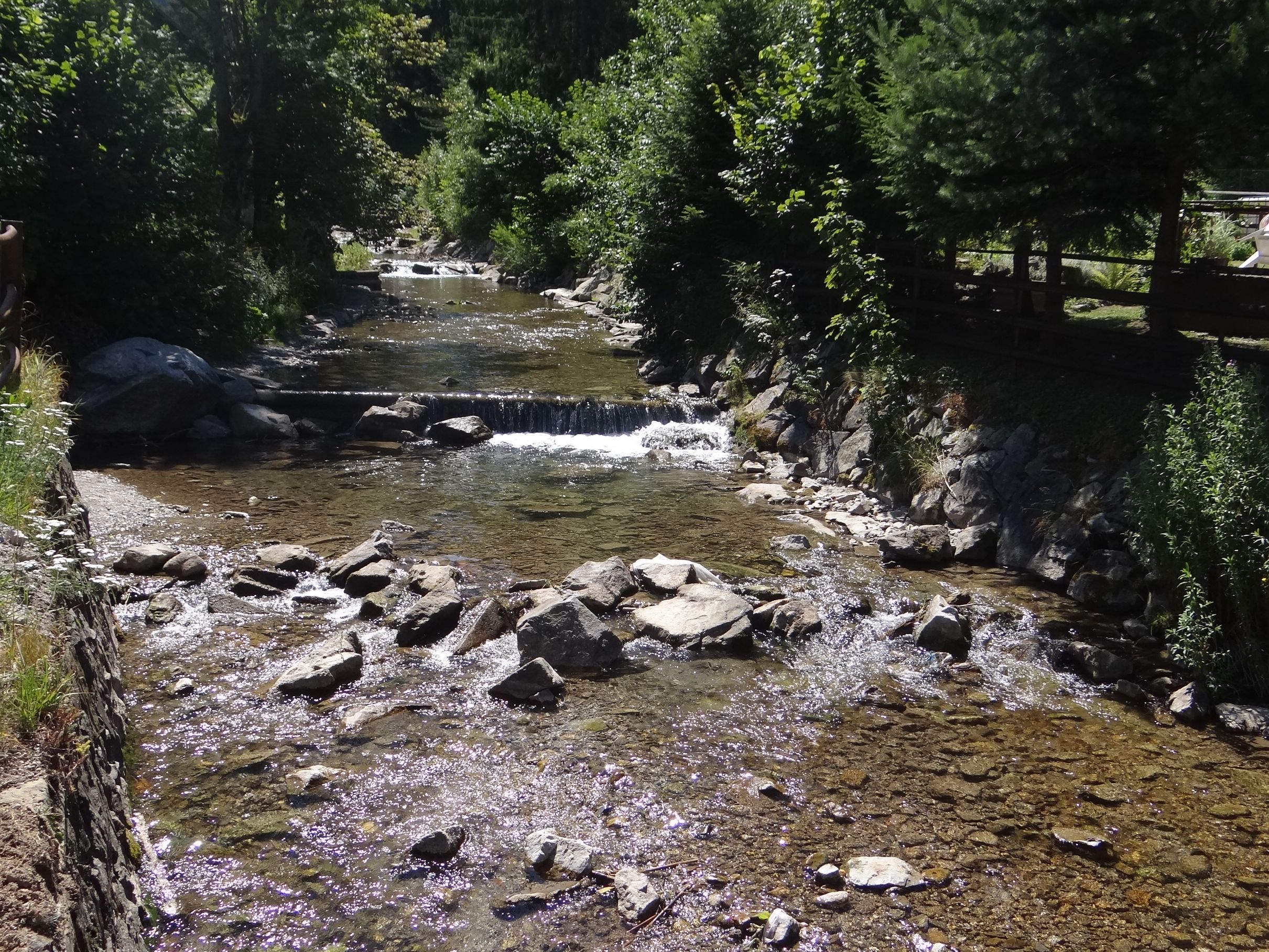 Vrátňanka